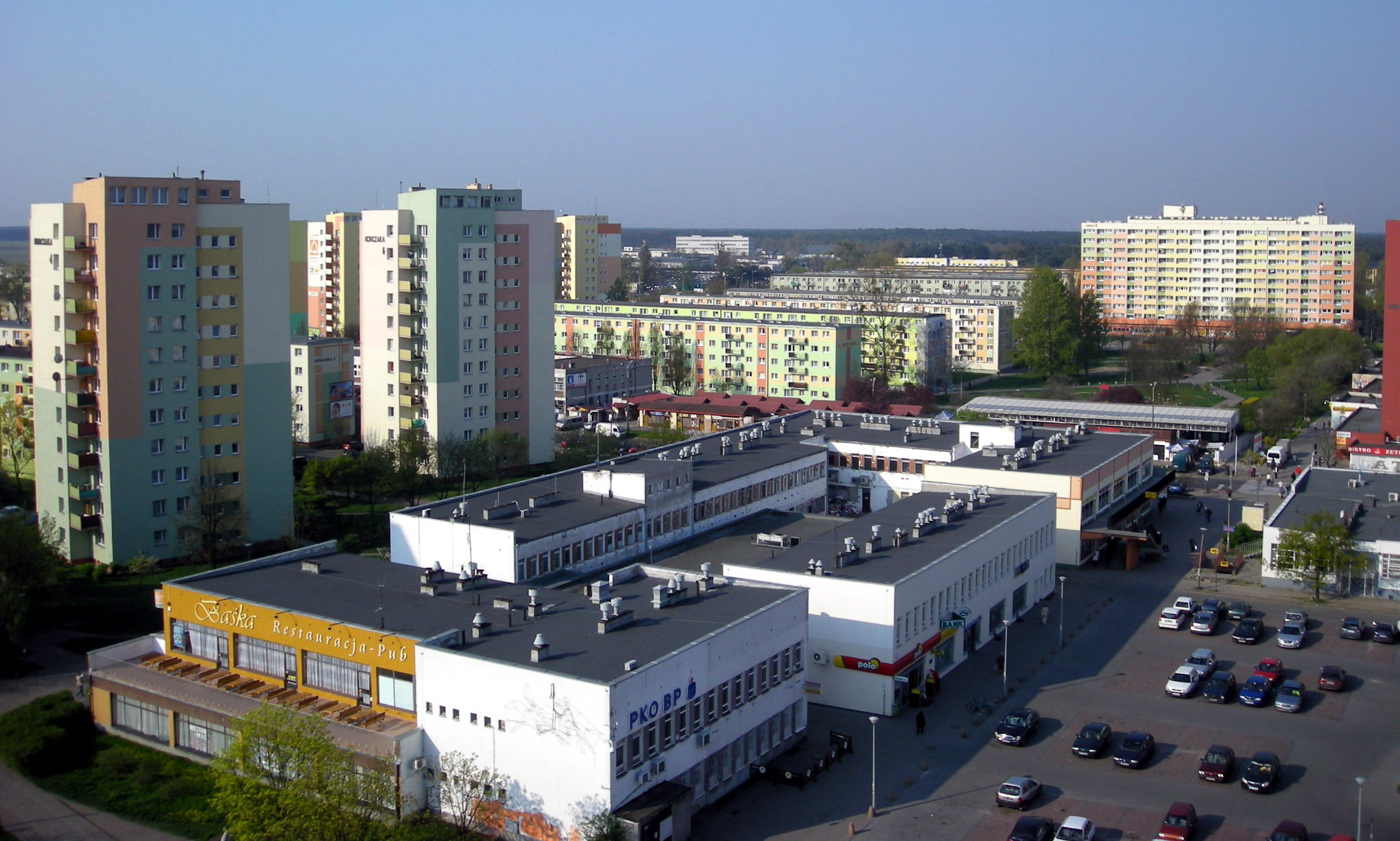 Panorama osiedla Błonie w Bydgoszczy, widok z wieżowca przy ul.Gałczyńskiego.